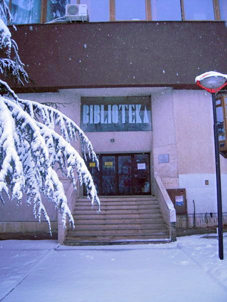 Народна_и_универзитетска_библиотека_Републике_Српске у Бањој Луци